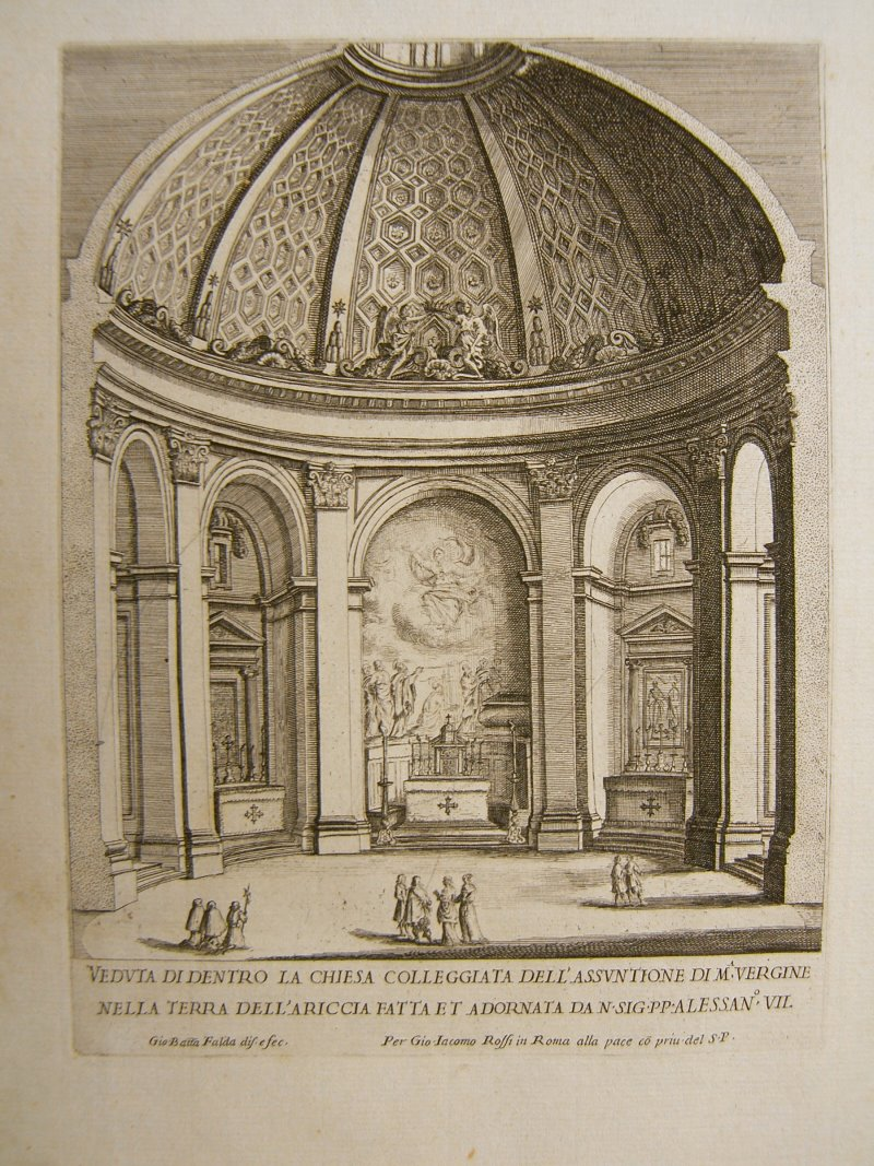 L'interno della Collegiata di Santa Maria Assunta ad Ariccia (RM)